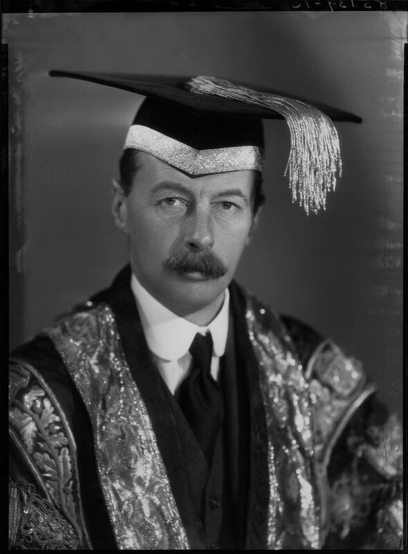 Lord Devonshire